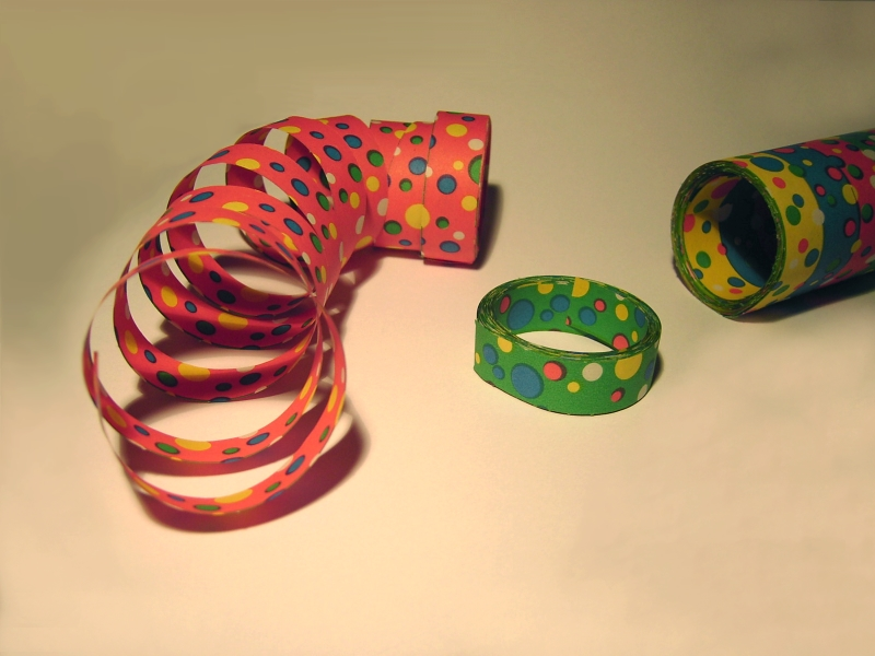 Luftschlangen